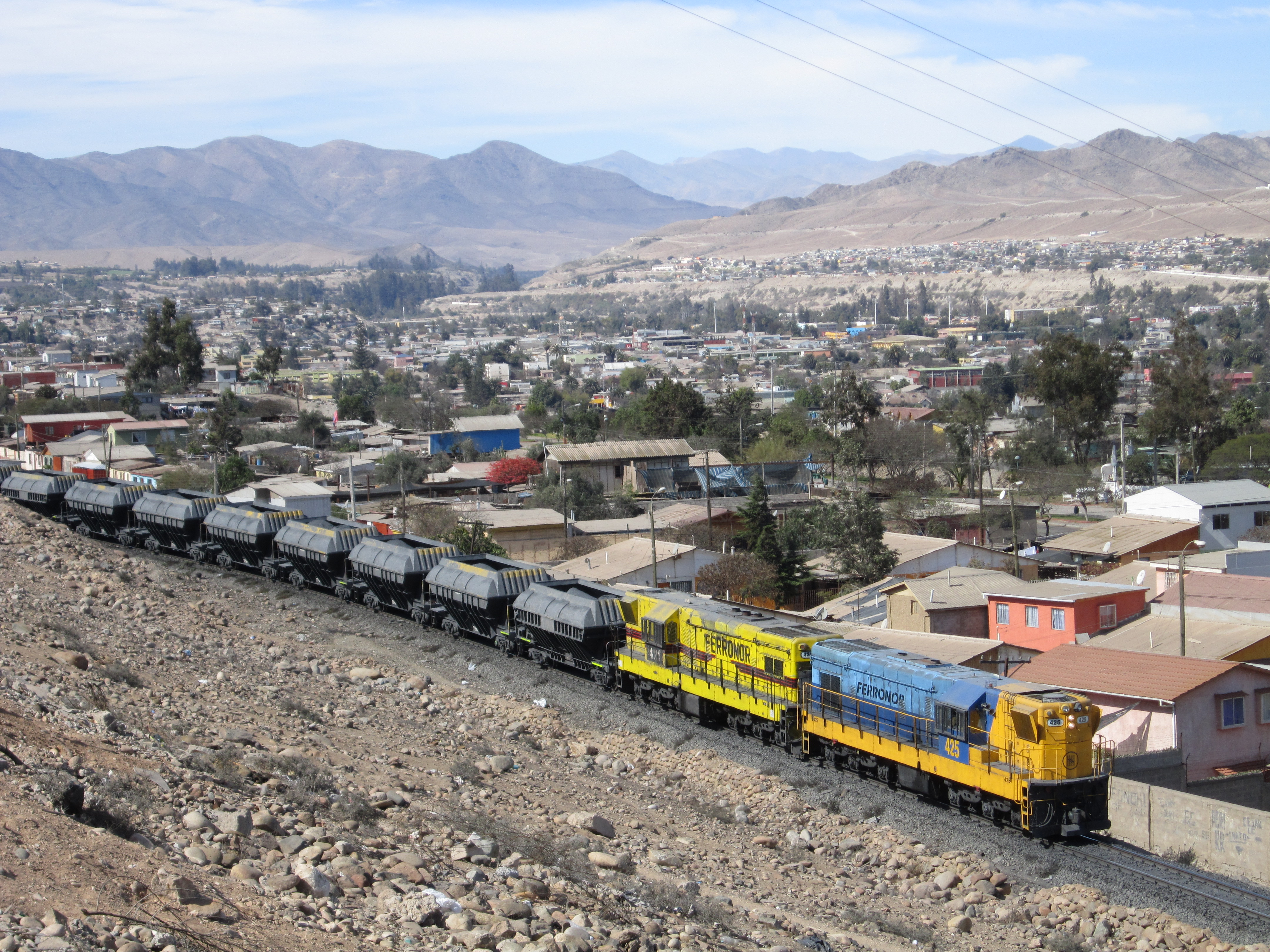 Dt-425 y Dt- 421 por el P.K 723.